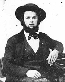 T. B. Walker.